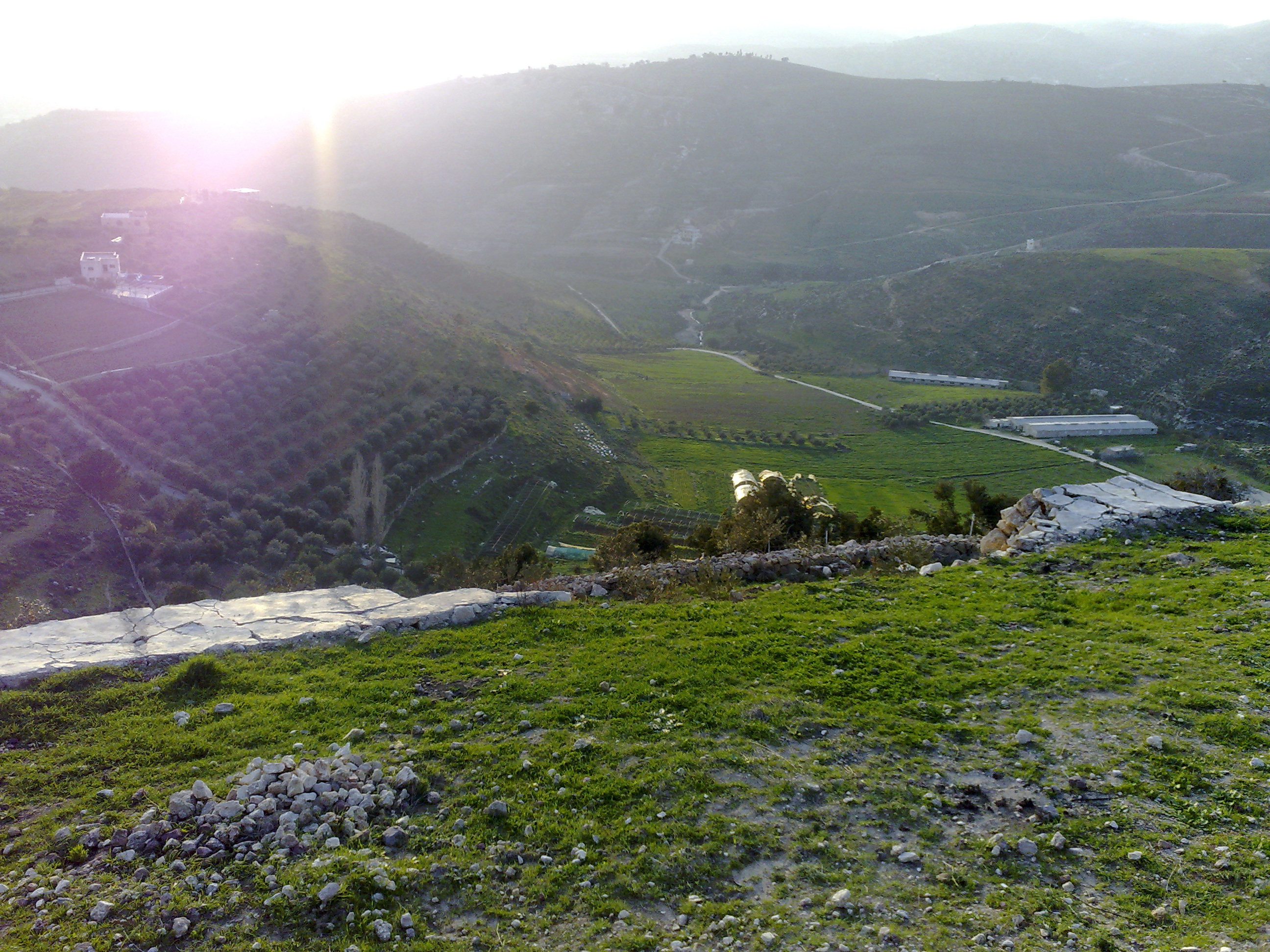 Mahis/Jordan